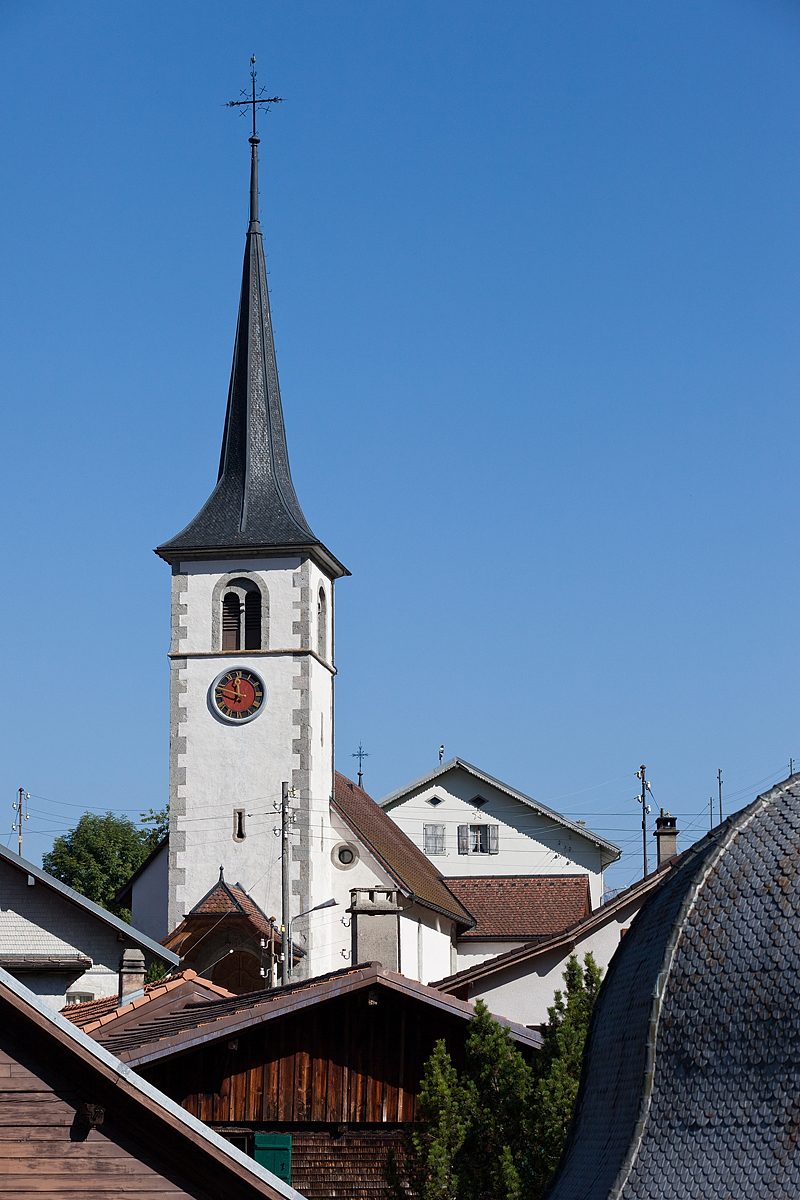 Eglise Saint-Martin à Lessoc (Haut-Intyamon) (FR)